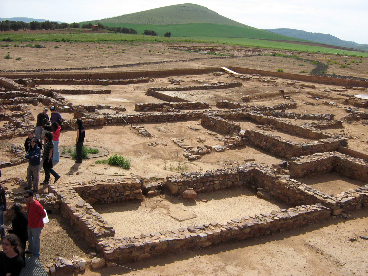 Fotografía del yacimiento de Oreto-Zuqueca, en Ciudad Real (España). La foto tiene una buena perspectiva, ya que se realizó desde una plataforma elevada que se encuentra en la parte central del sitio.